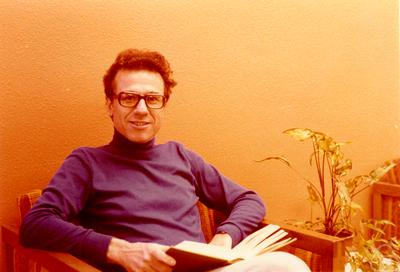 Foto di Ernest Michael